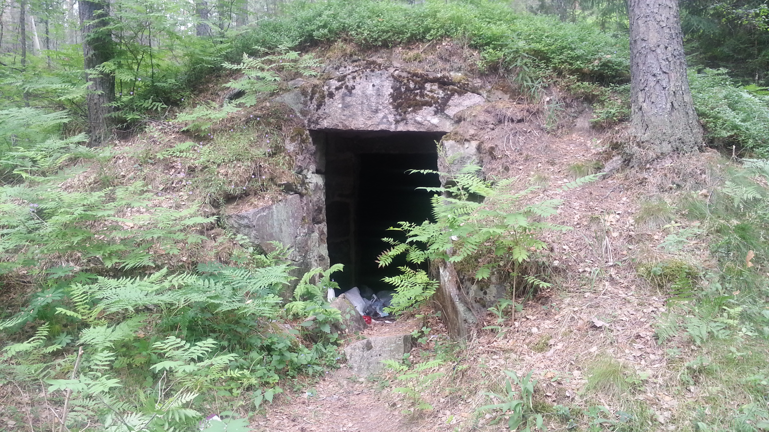 Старое заброшенное сооружение, вероятно - бункер.